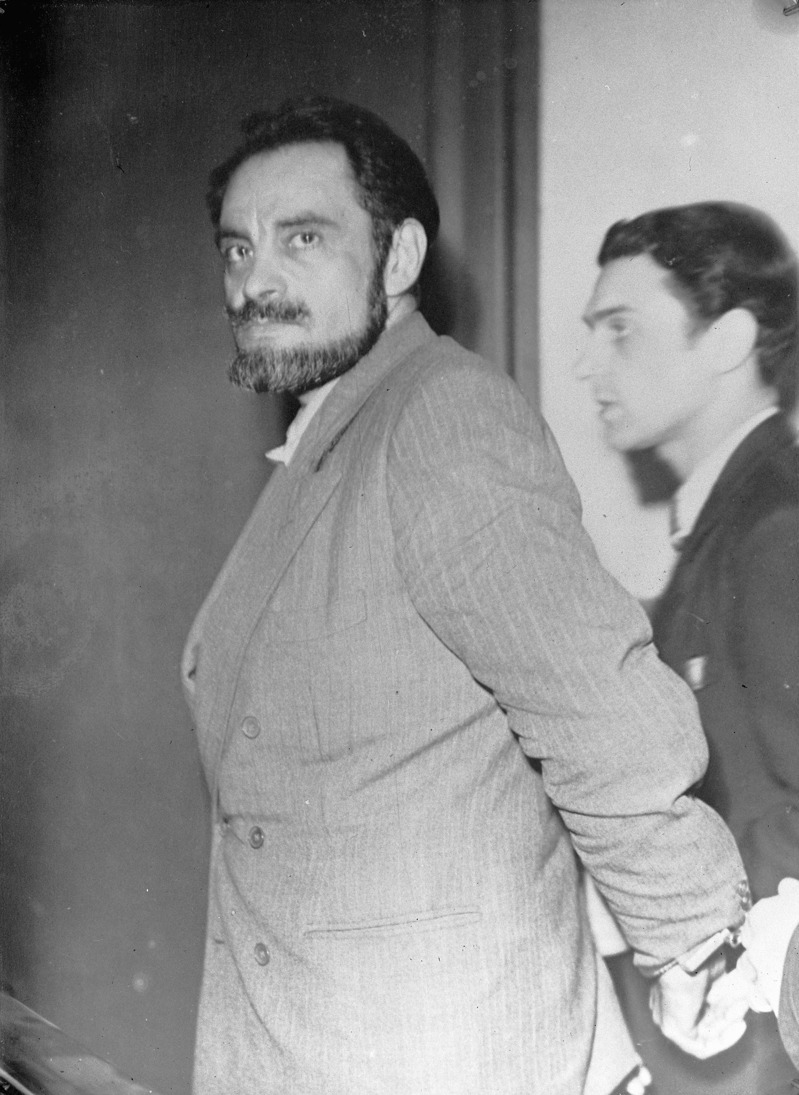 Collectie / Archief : Fotocollectie Anefo Reportage / Serie : [ onbekend ] Beschrijving : Dokter Petiot Datum : 15 maart 1946 Persoonsnaam : petiot Fotograaf : Agence France Presse (AFP) Auteursrechthebbende : Nationaal Archief Materiaalsoort : Glasnegatief Nummer archiefinventaris : bekijk toegang 2.24.01.09 Bestanddeelnummer : 901-5717